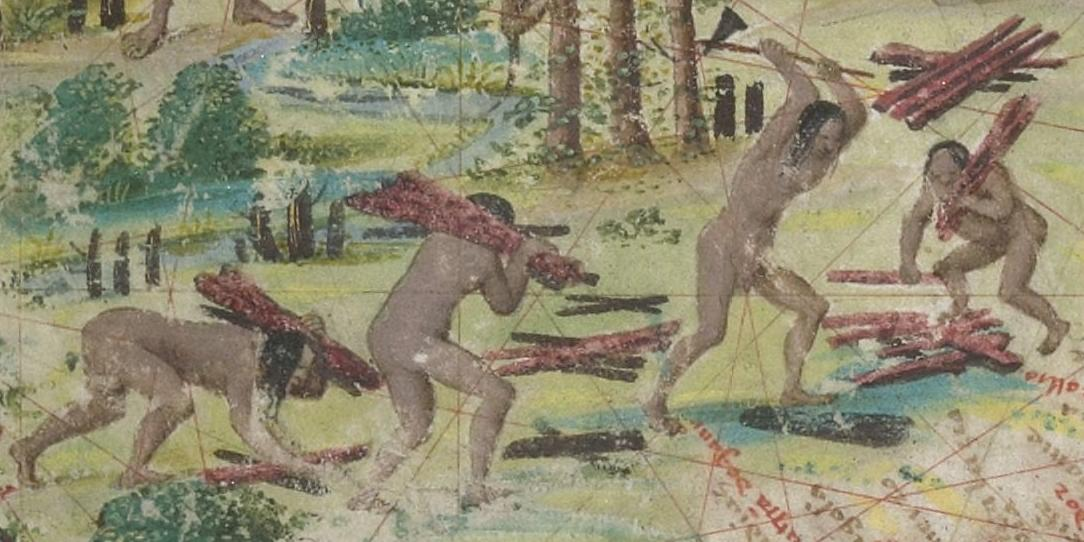 Indígenas brasileños recogiendo palo brasil en el mapa de la "Terra Brasilis" del Atlas Miller.